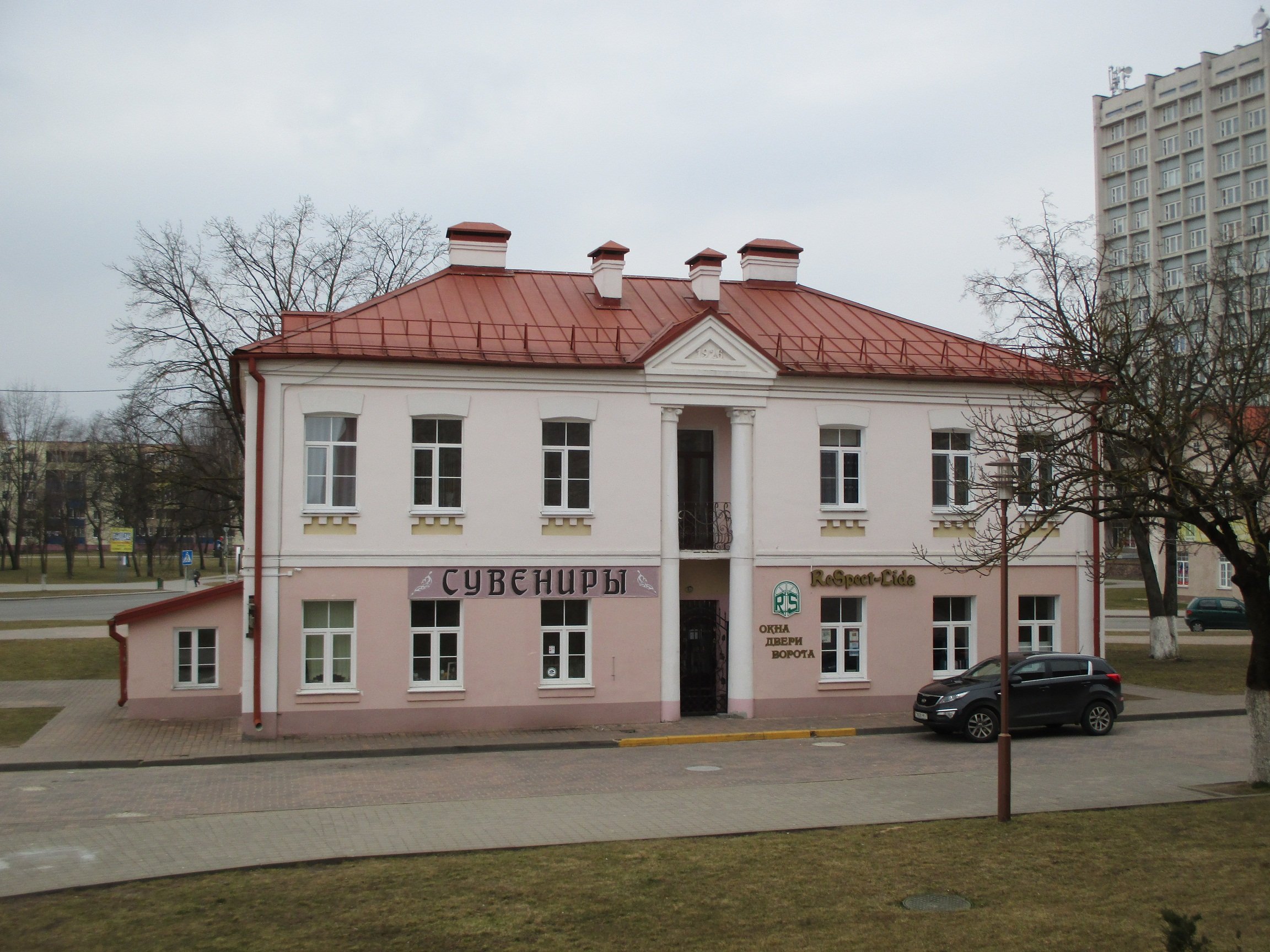 Беларусь, Ліда, Замкавая вуліца